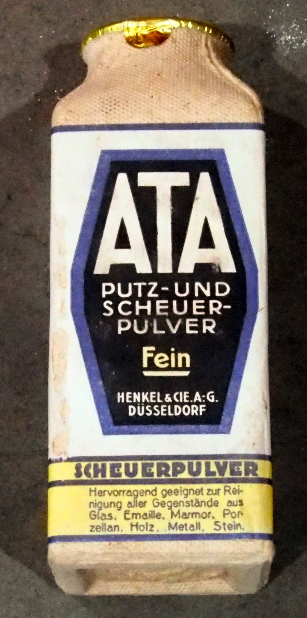 ATA Putz- und Scheuer-Pulver, Fein